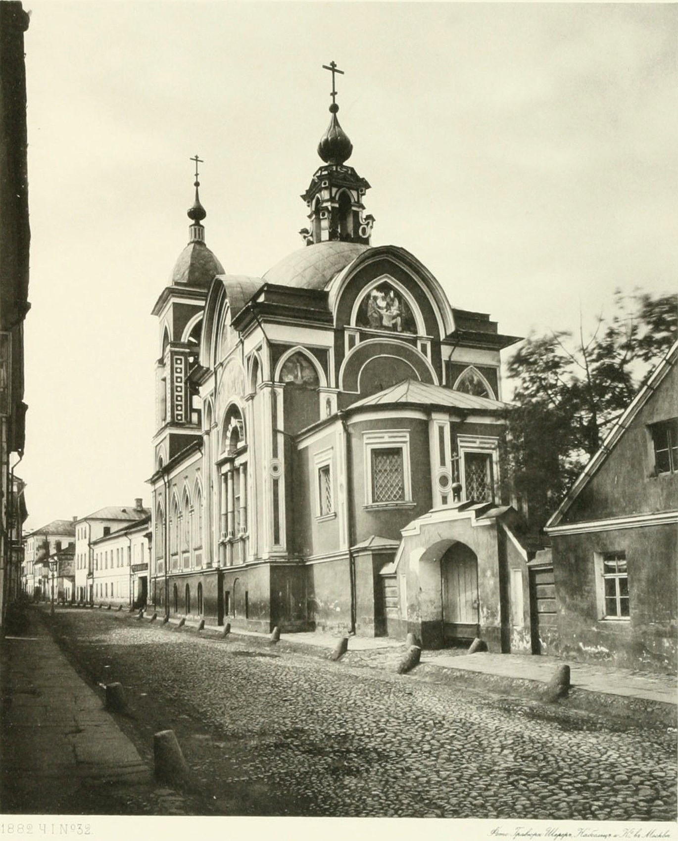 Церковь Николая Чудотворца именуемая «Мокрым» (разрушена)